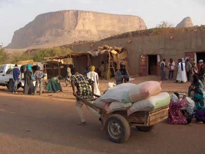 Hombori: Nouveau village (construit lorsque la route goudronnée est apparue)